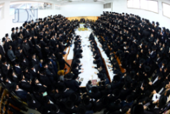 טיש בחסידות נדבורנה